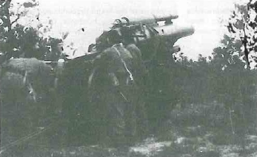 Moździerz wz. 32 podczas ładowania pocisku w 1 pan [opis oryginalny]